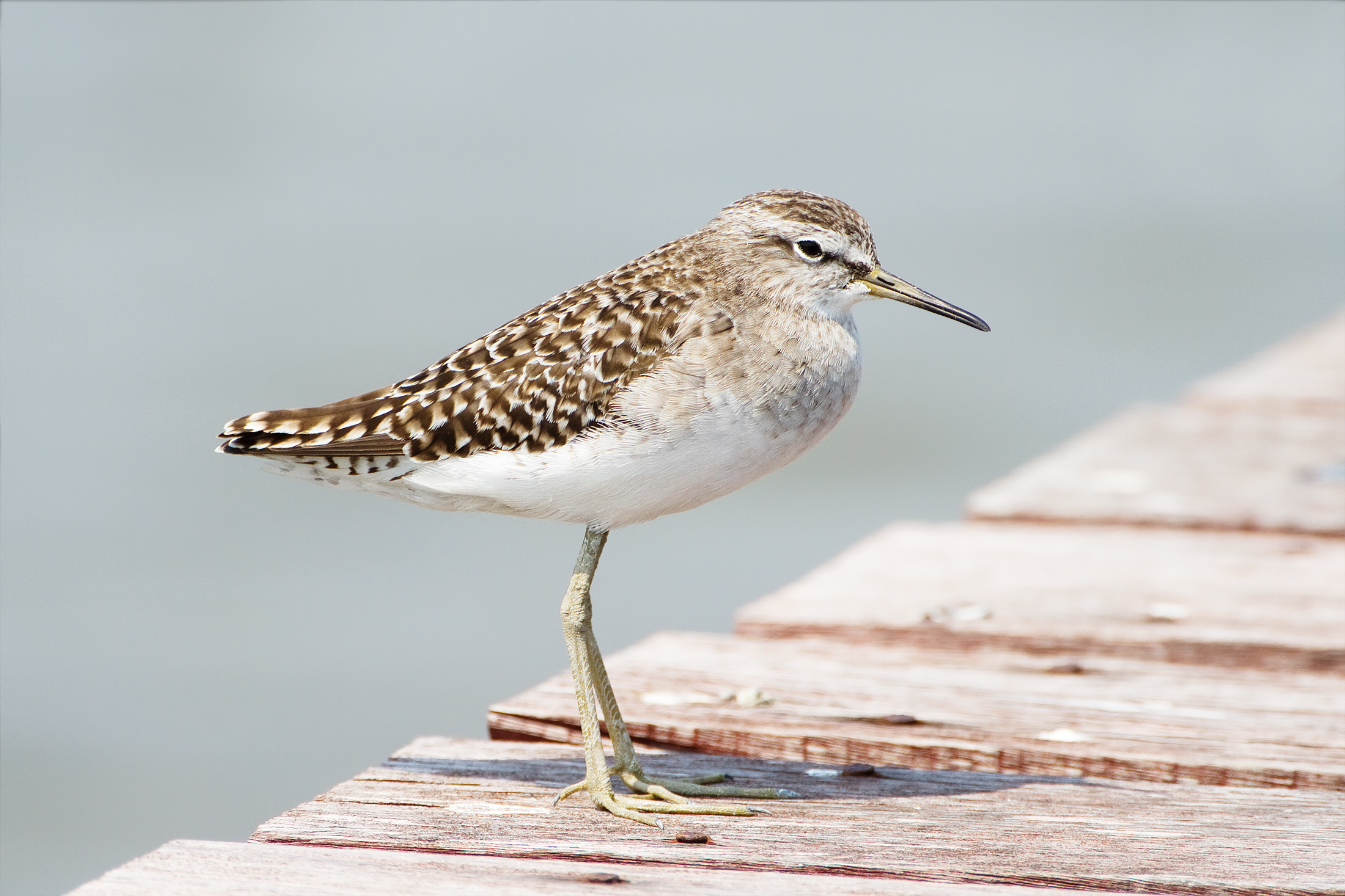 Wood Sandpiper (Tringa glareola), Laem Phak Bia, Ban Laem, Phetchaburi, Thailand